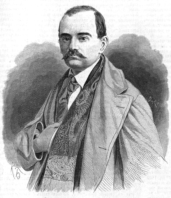 Щербина, Николай Фёдорович